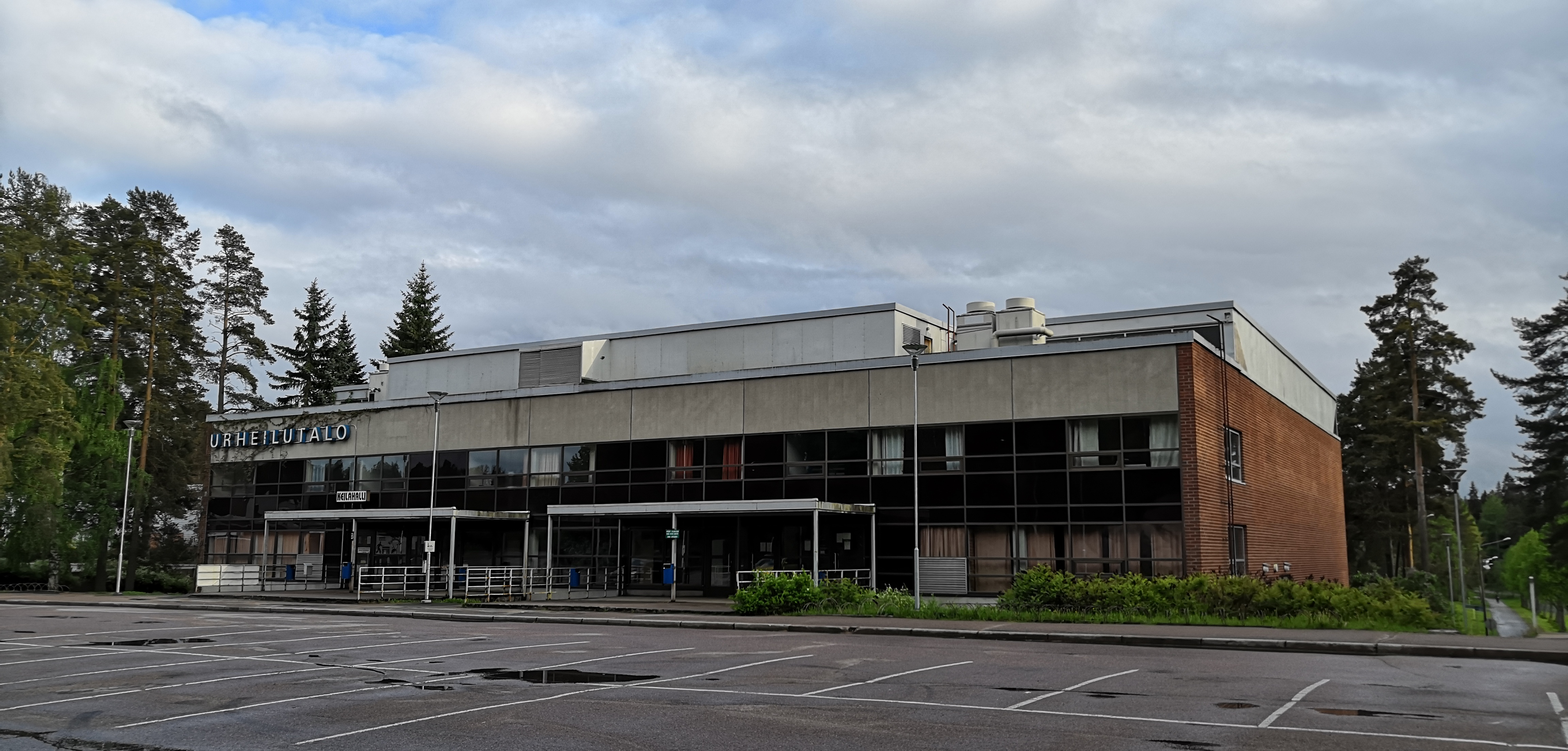 Kuusankosken uimahalli